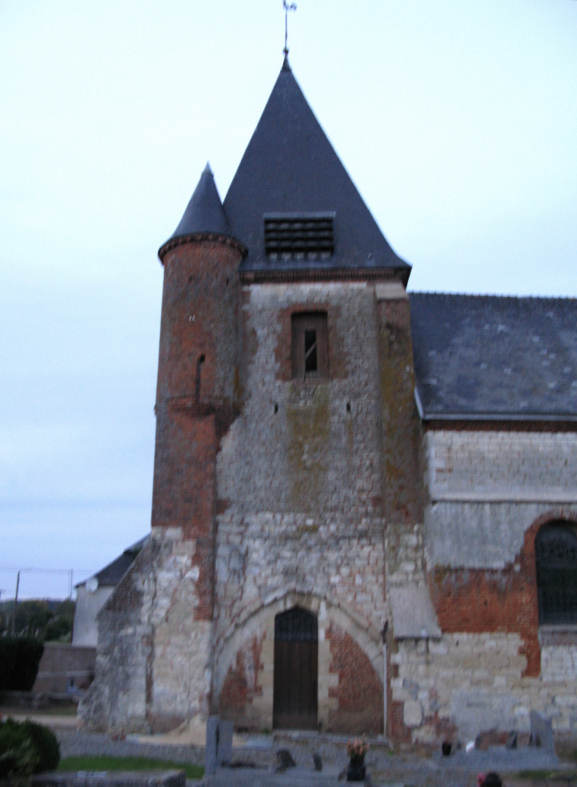 Noircourt (Aisne, France) - La façade Sud du clocher de l'église fortifiée. Photo floue (vu les conditions de faible lumière à la prise de vue, sans pied) qui devra être refaite.